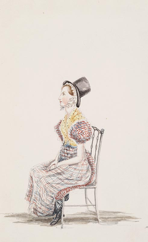 Cambrian Costumes Welsh girl in costume